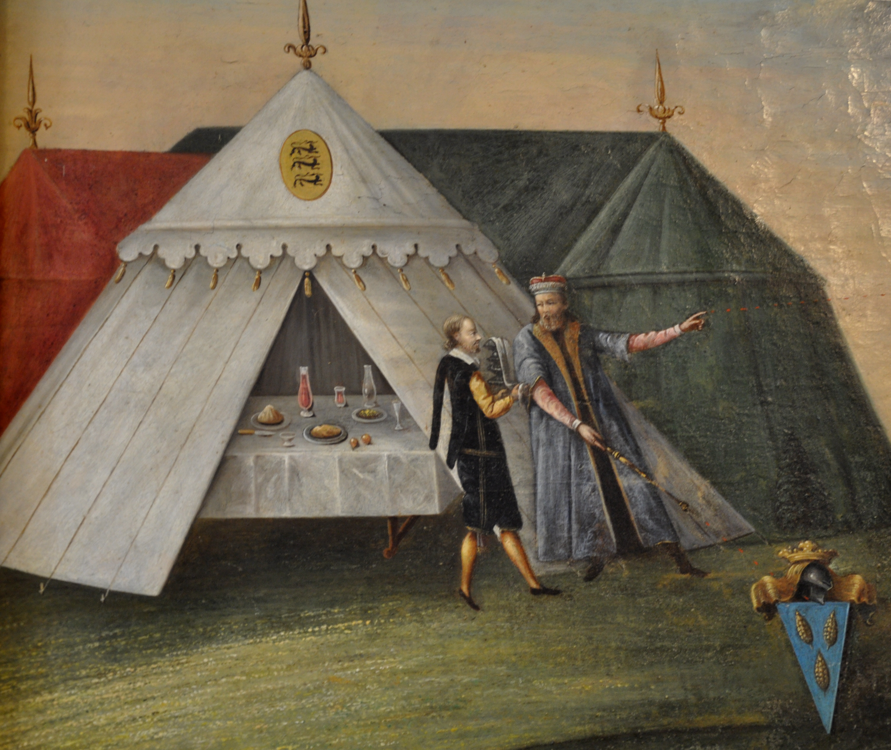 Burg Waldburg (Württemberg), Gemälde aus einer Reihe von Historiengemälden des 17. Jahrhunderts zur Geschichte des Hauses Waldburg (mehrfach angefertigt), legendäre Gründungsgeschichte des Hauses (mit Ansicht von Waldburg); Detail: Zelt full image